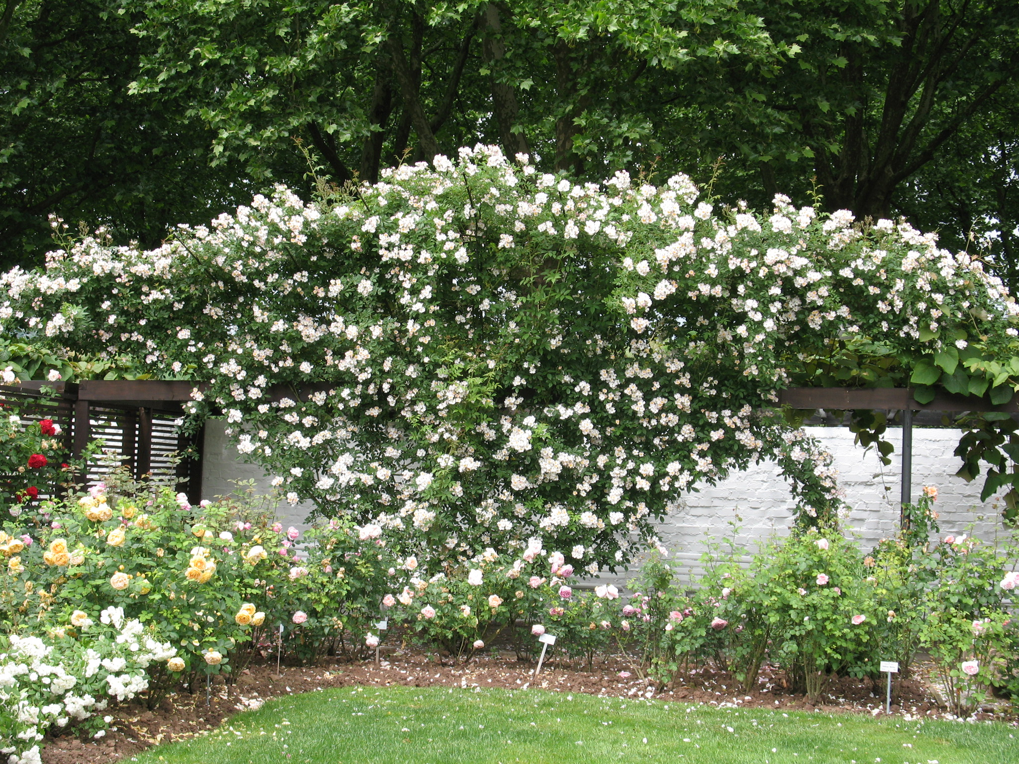 Das Bild zeigt eine Kletterrose im Rosengarten in Zweibrücken im Sommer 2007.